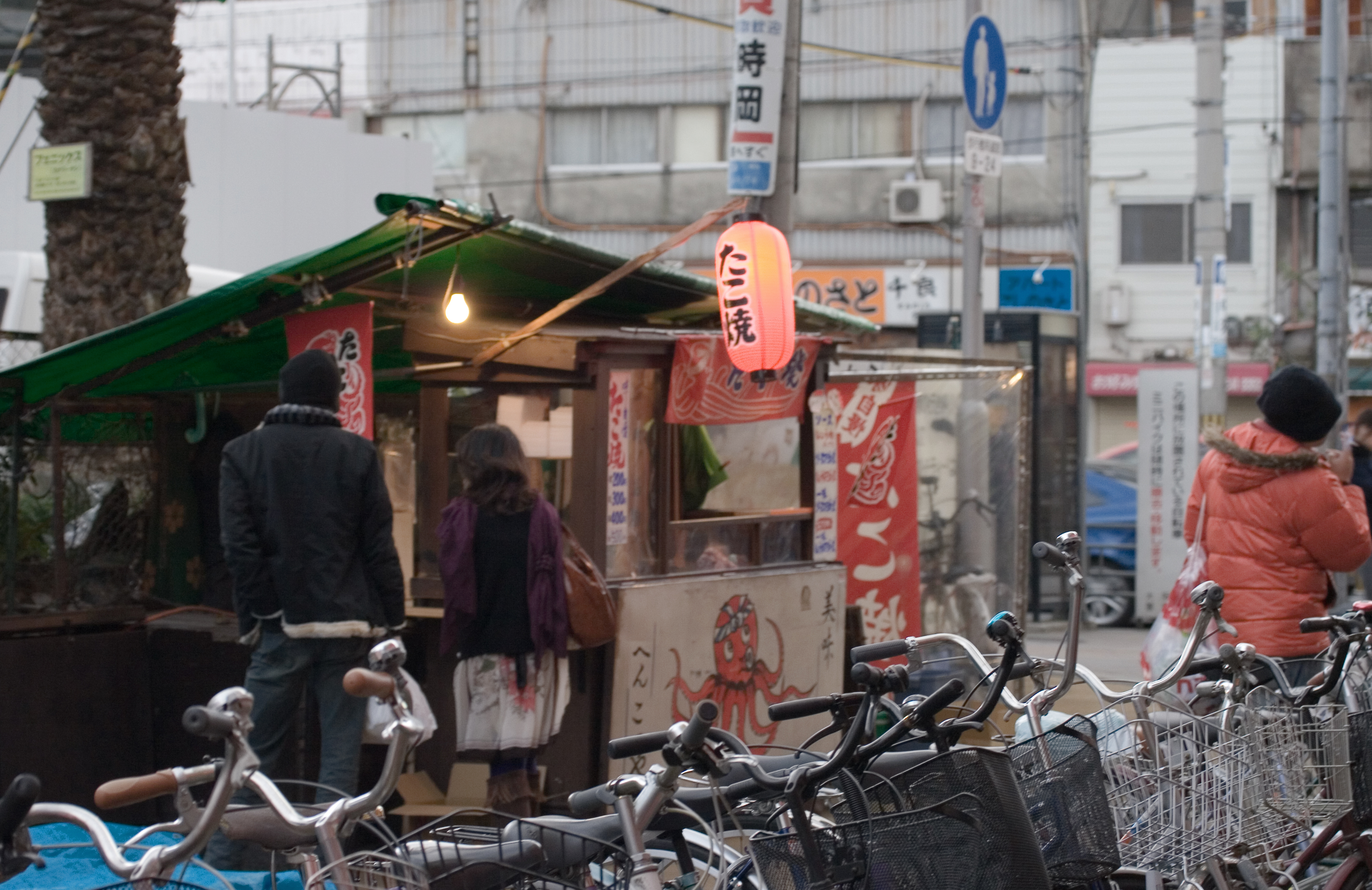 たこ焼き屋（大阪市西成区山王1丁目17番地、地下鉄動物園前駅1番出口すぐ、動物園前一番街近くの常設たこ焼き屋台「へんこつや」）6437